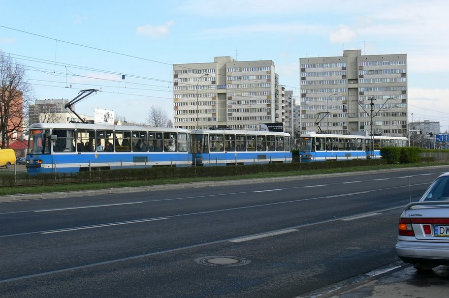 Tramwaj typu Konstal 105NAs po modernizacji we wrocławskim "Protramie".